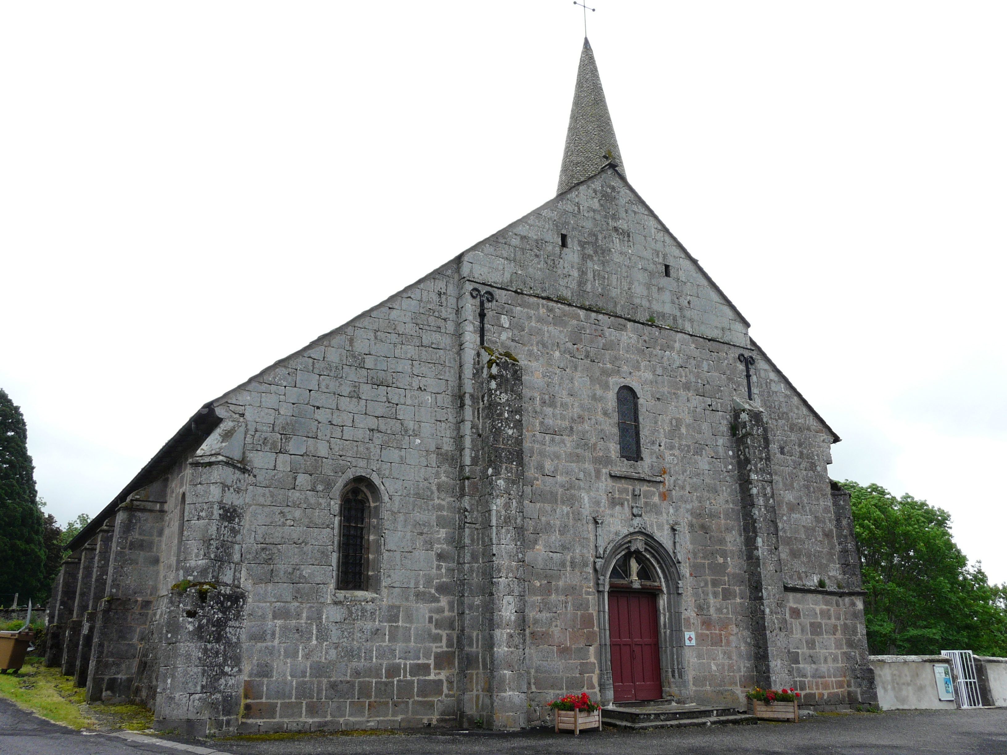 La façade ouest de l'église Saint-Pardoux, La Tour-d'Auvergne, Puy-de-Dôme, France.